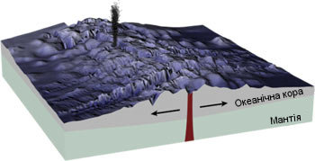 Схема будови океанічного хребта